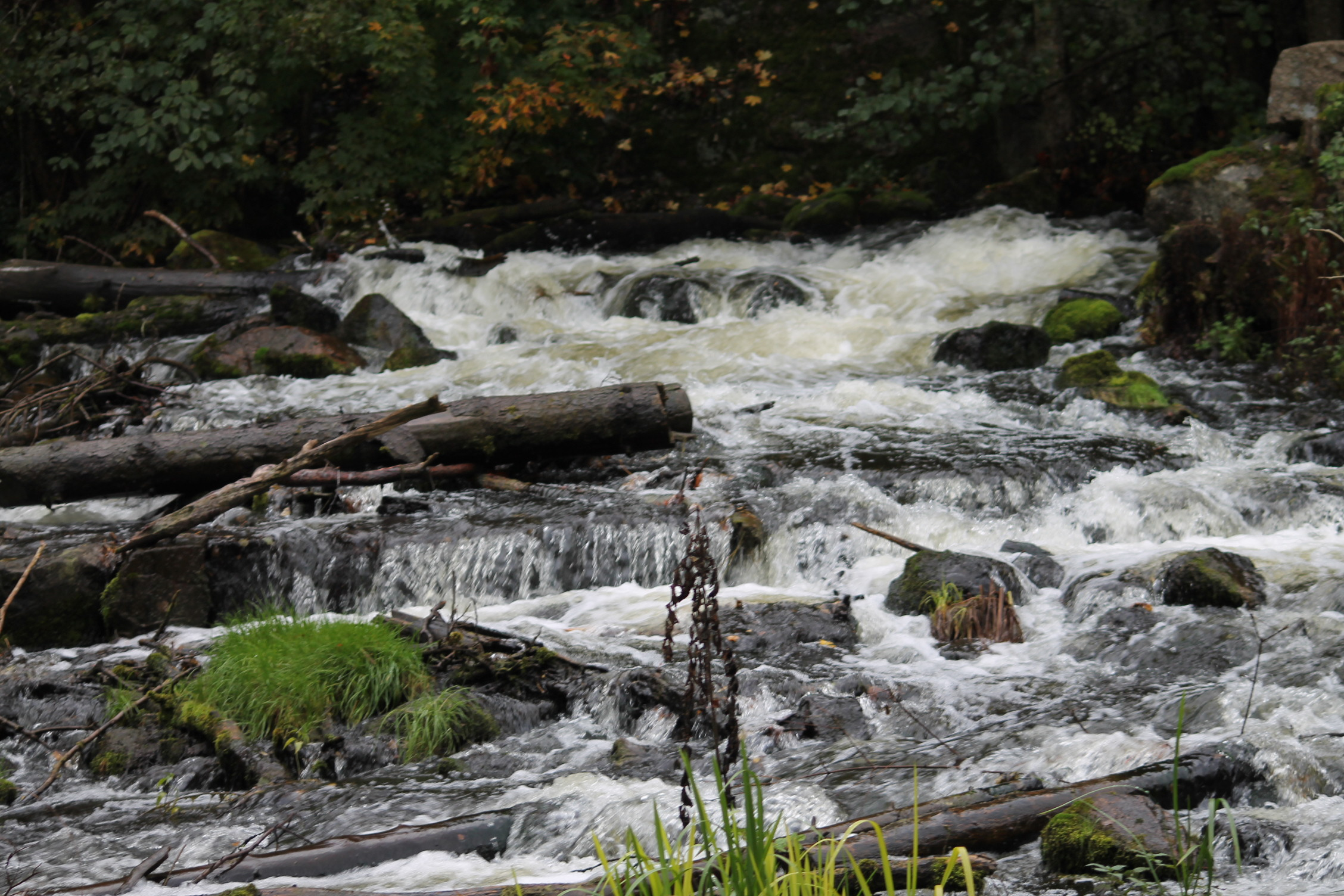 En bra plats att fota på.